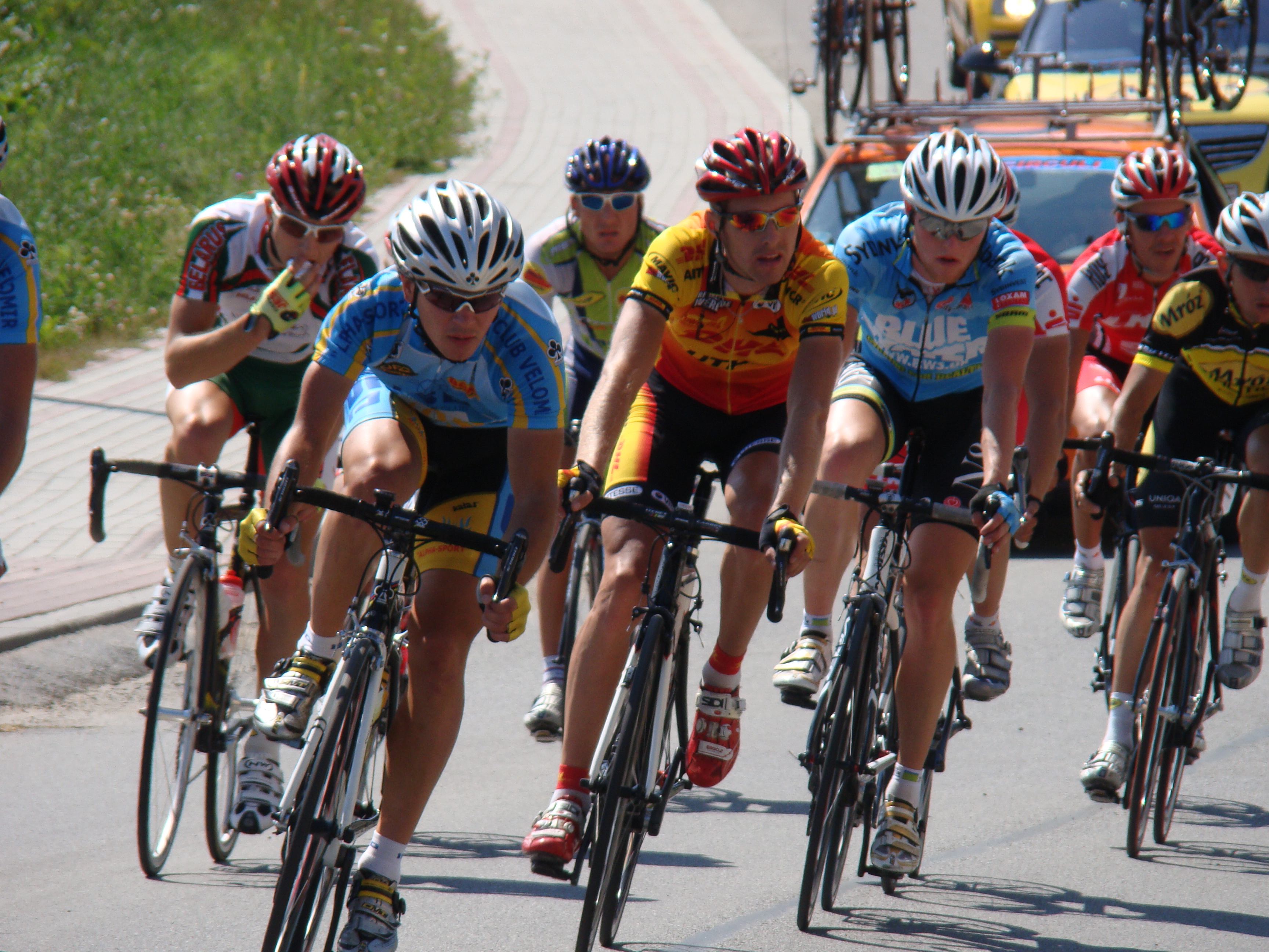 10. Międzynarodowym Wyścigiem Kolarskim o Puchar Uzdrowisk Karpackich. Droga wojewódzka W-889. Bukowsko.